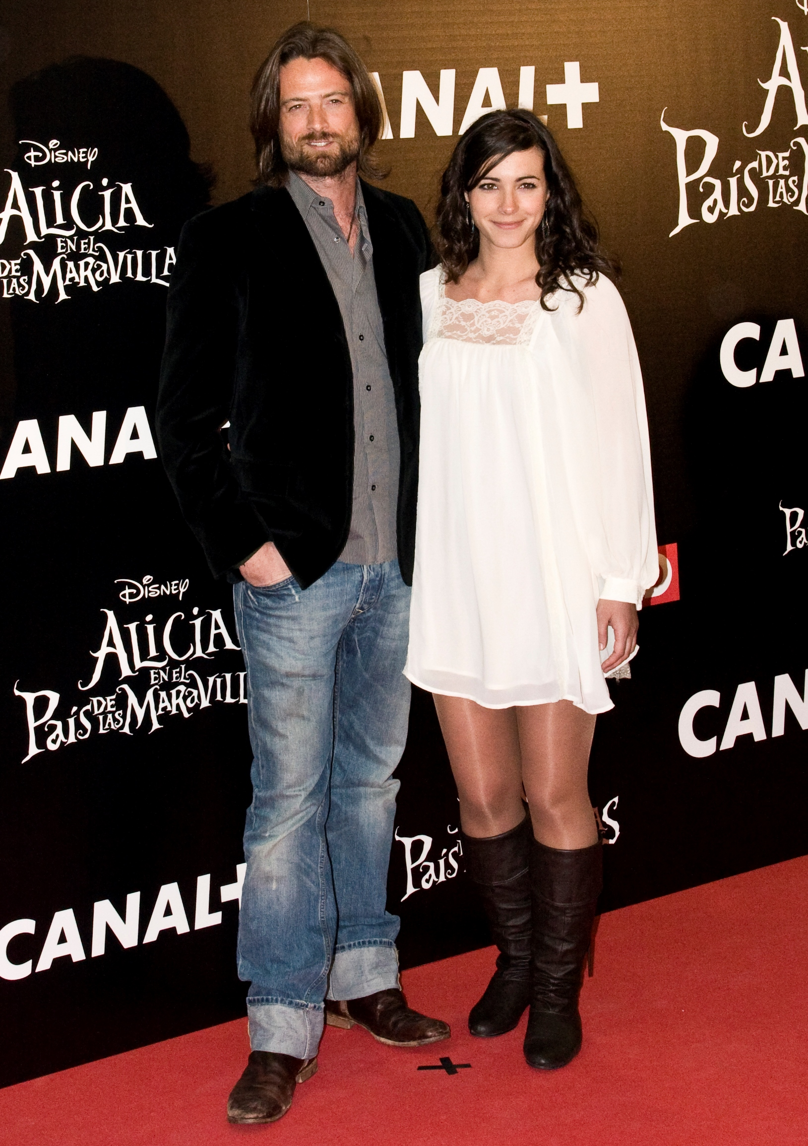 William Miller y María Cotiello actores españoles, en el photocall de Alicia en el país de las Maravillas en 2010.